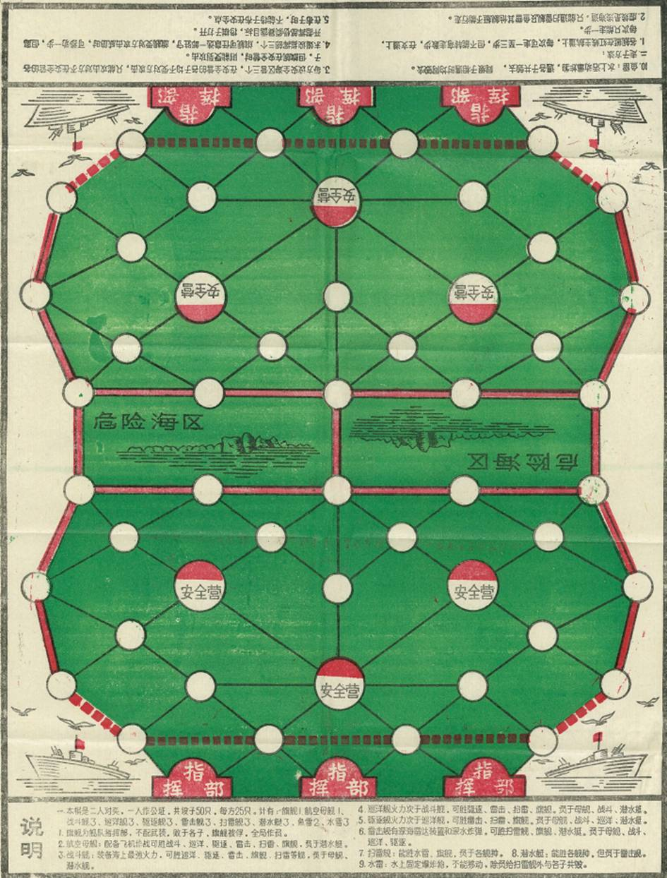 中文（台灣）: 春水綜合廠生產的海軍棋棋盤